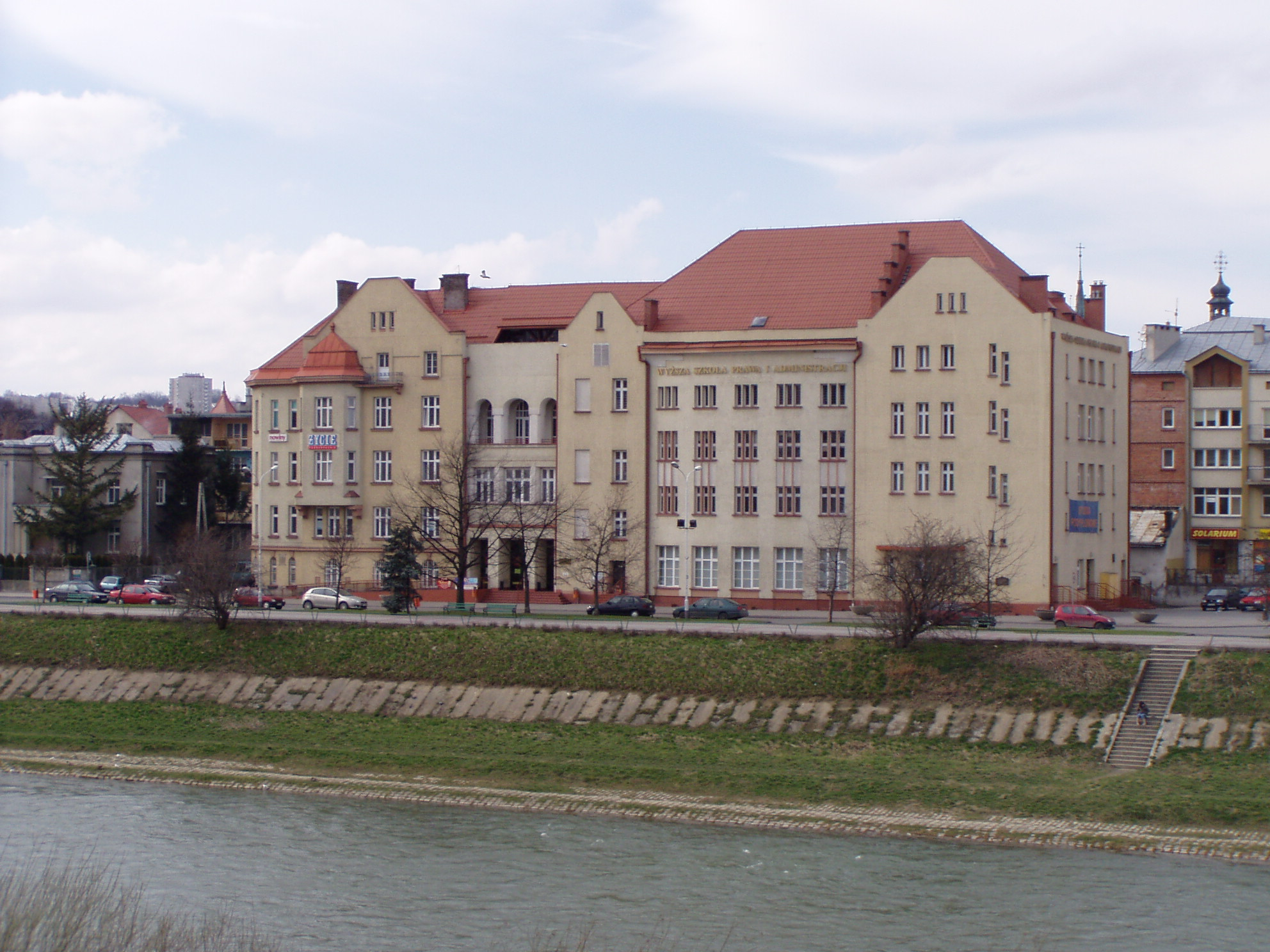 Modernistyczny Dom Robotniczy.